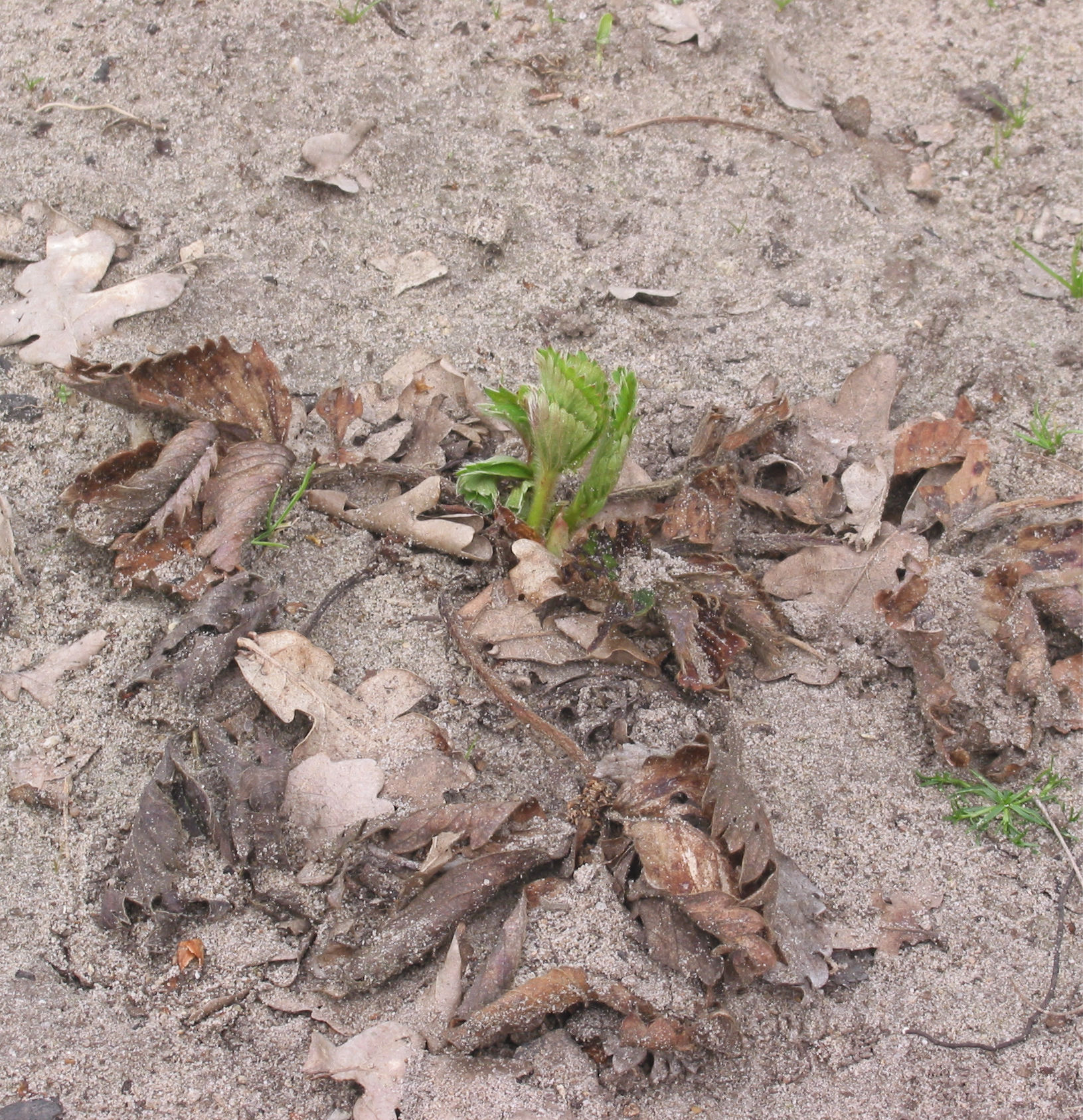 (nl: Aardbei plant in het voorjaar) Fragaria × ananassa plant in spring